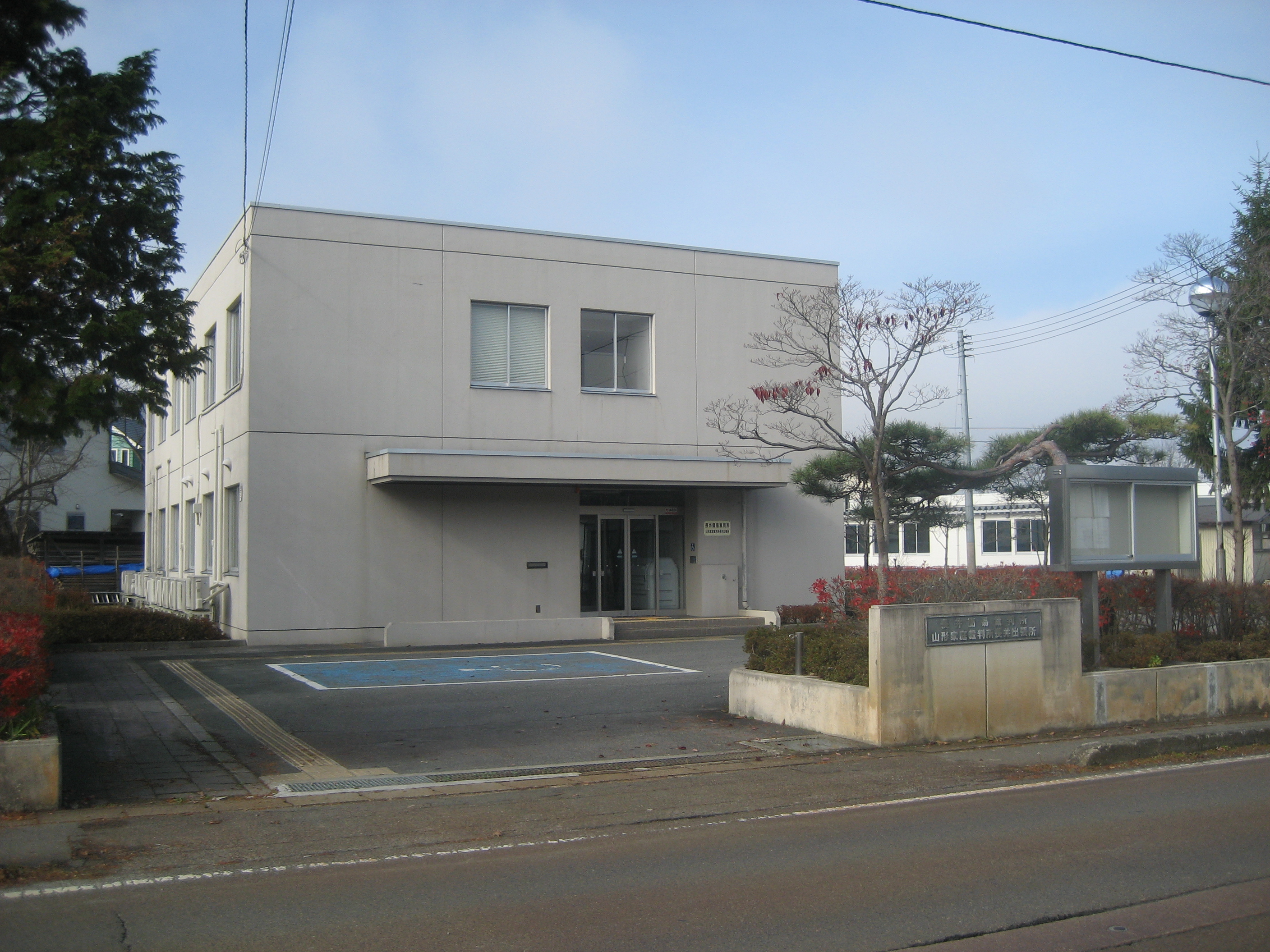 長井簡易裁判所・山形家庭裁判所長井出張所庁舎